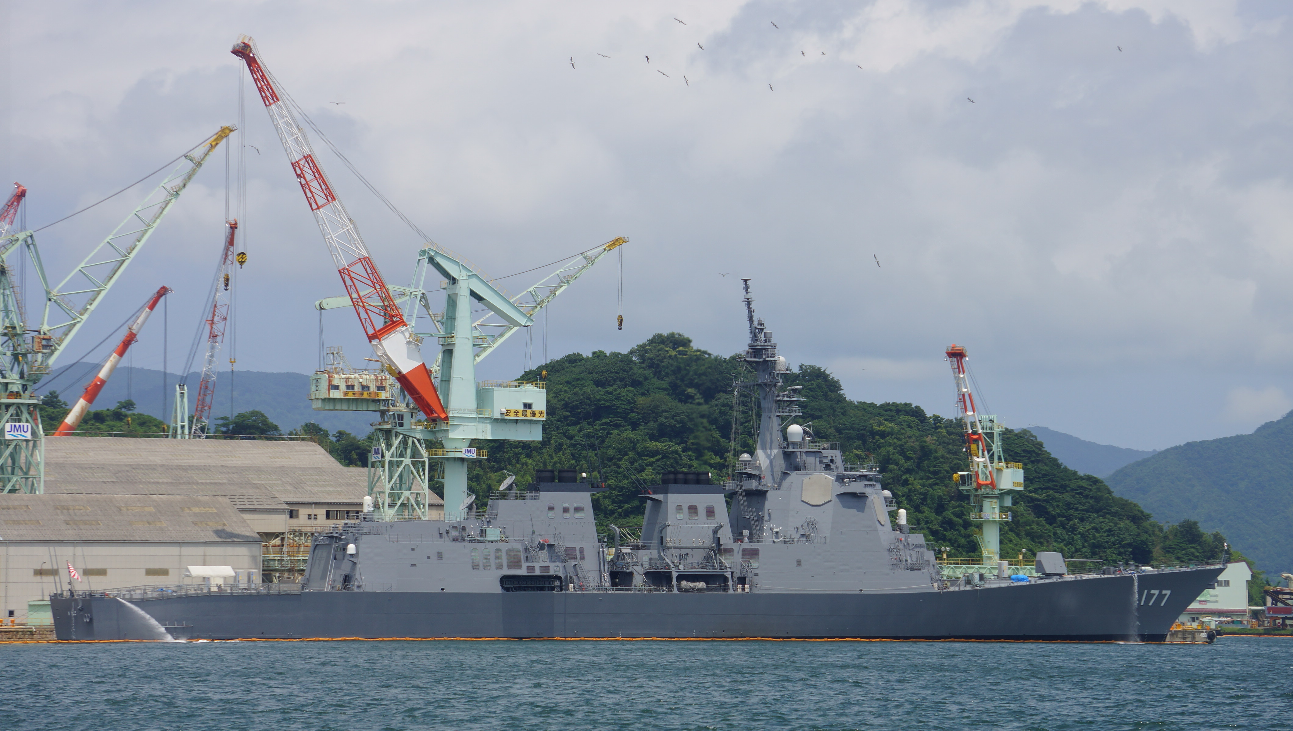 海上自衛隊 護衛艦あたご（DDG-177）。 14年7月27日 舞鶴にて。